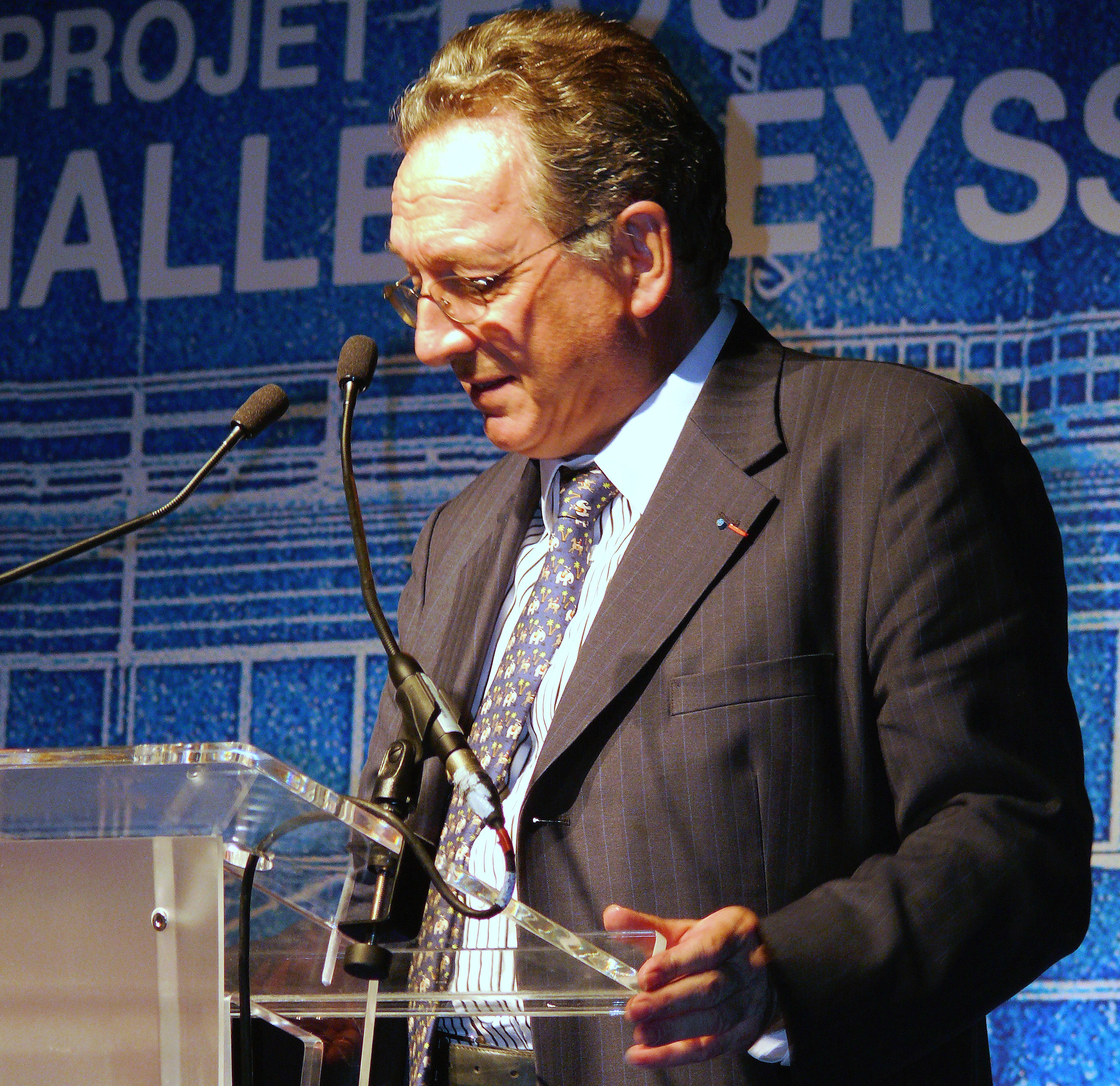 Michel Virlogeux pendant son intervention pour la sauvegarde de la Halle Freyssinet